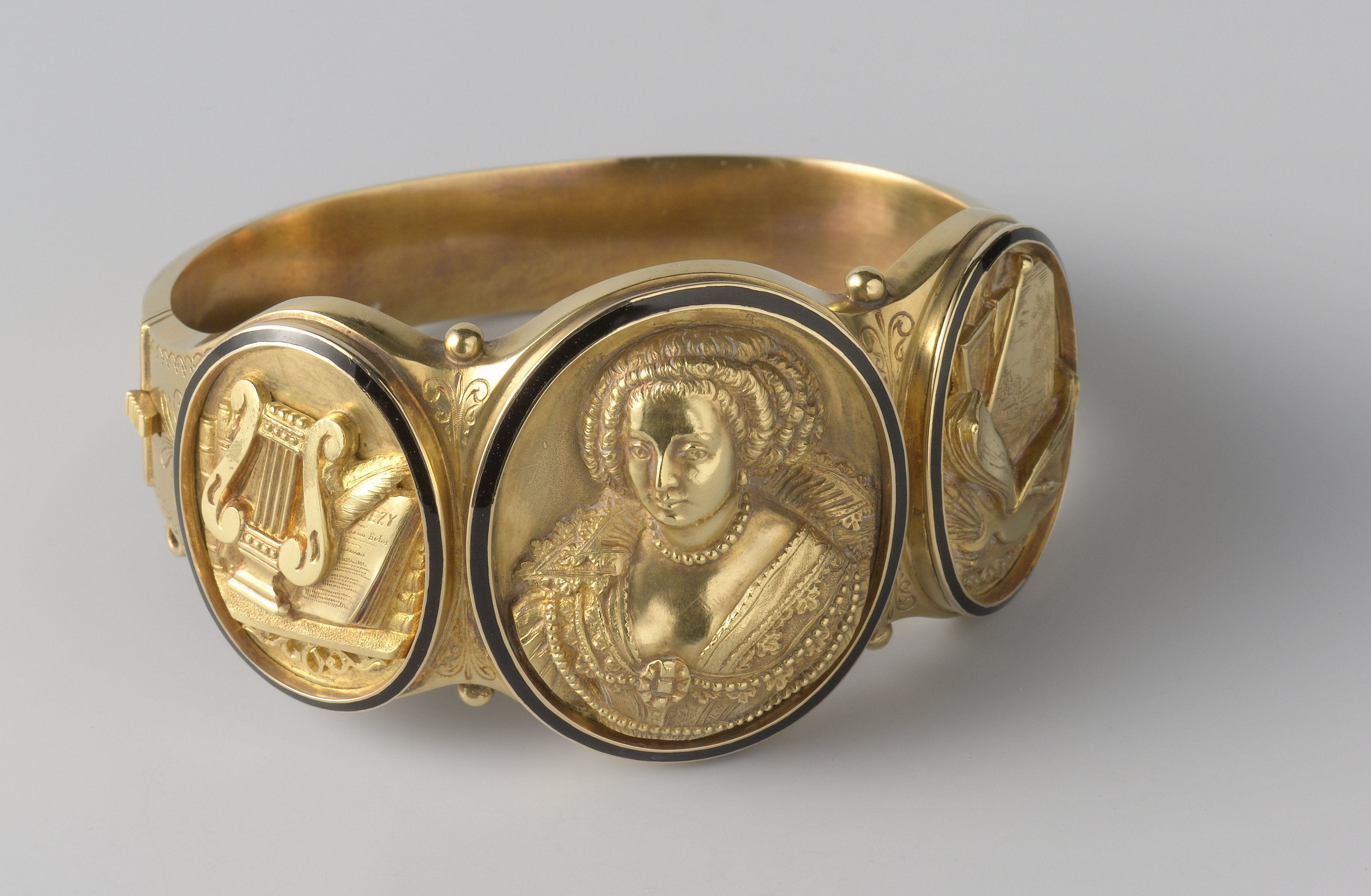 Armband, onderdeel van de Potgieter-parure (ca. 1855)